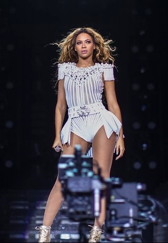 Beyonce durante el The Mrs. Carter Show World Tour en Amberes Bélgica